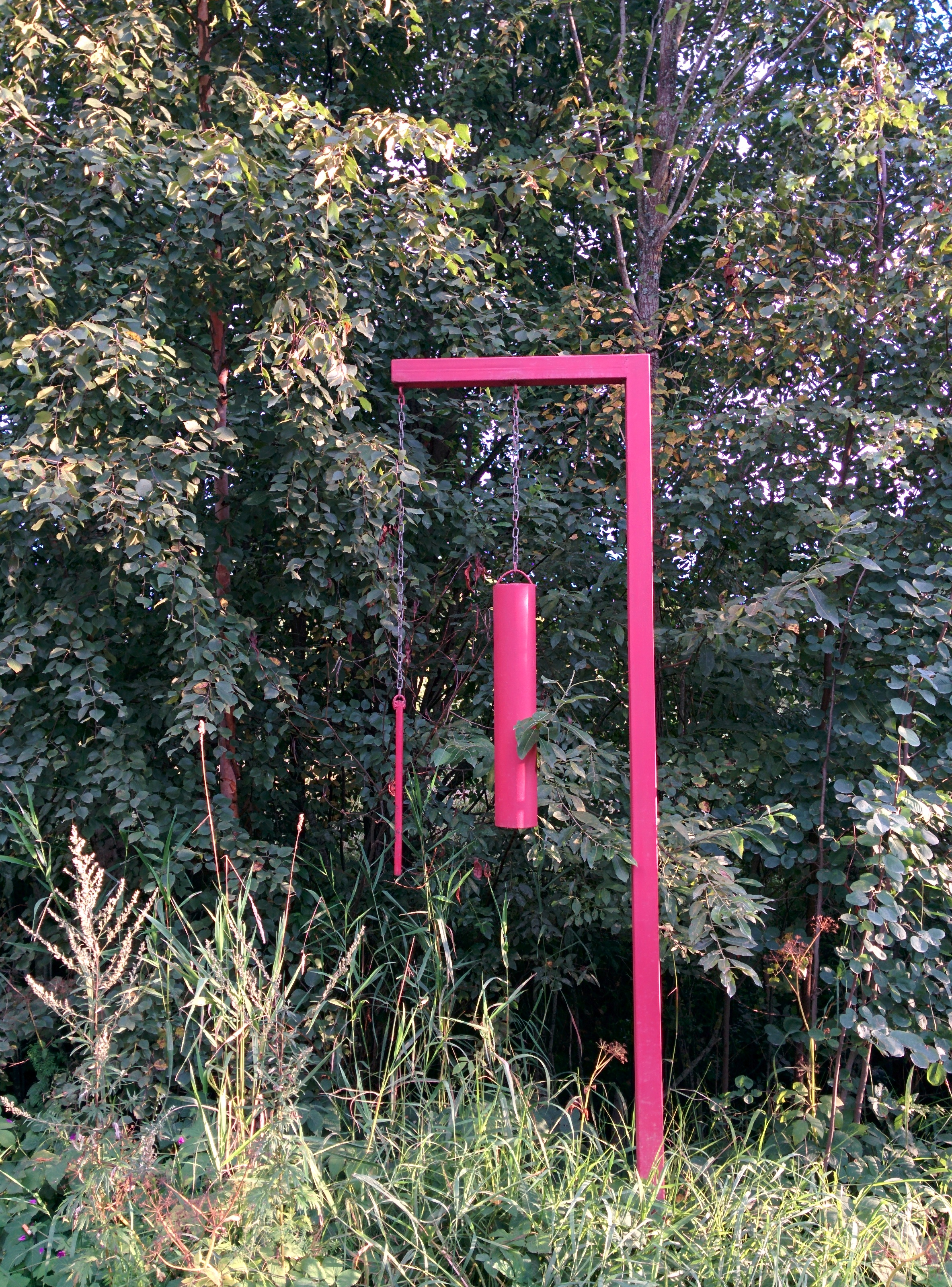 Рында во Владимировке